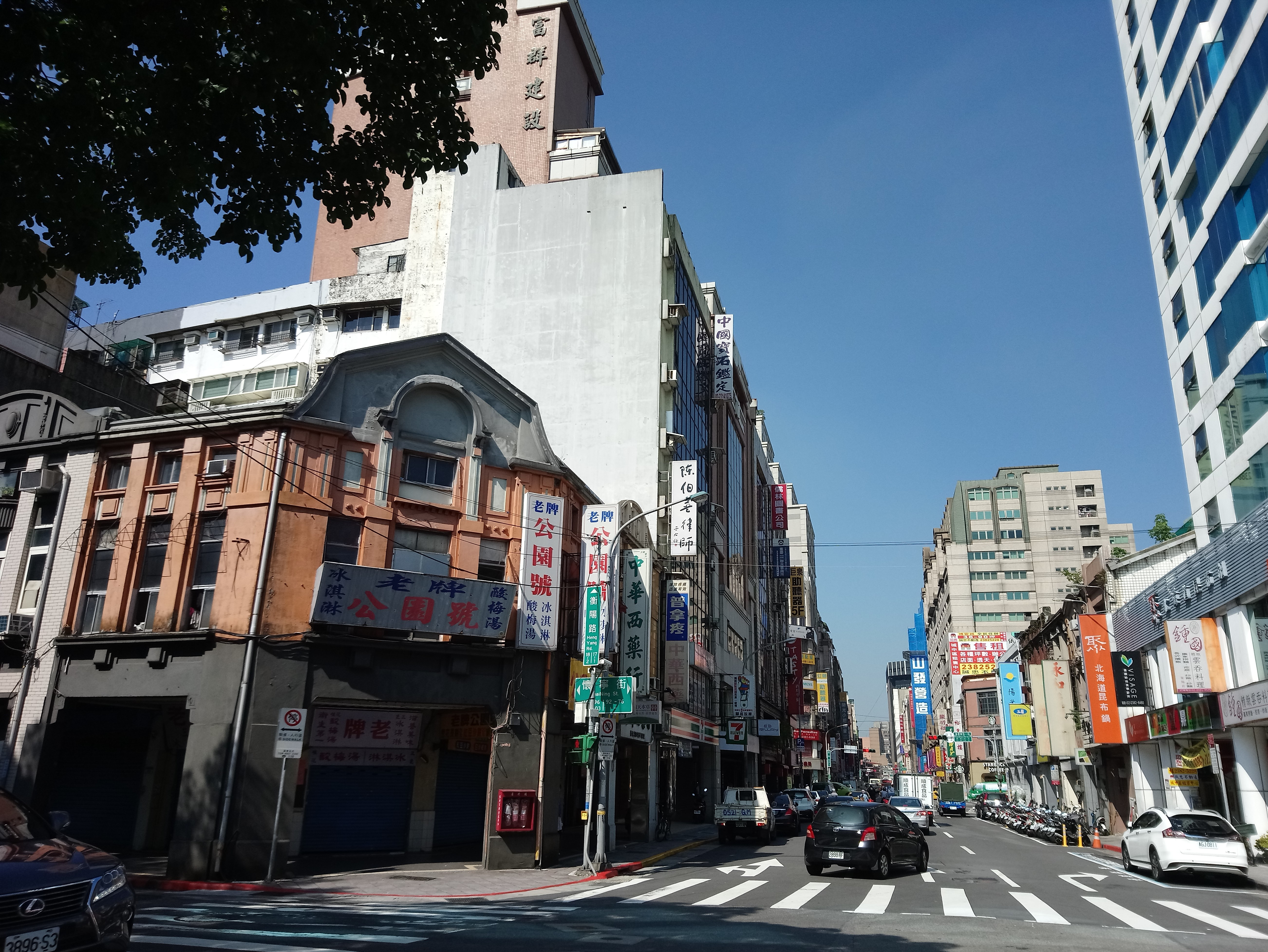 衡陽路(原榮町通),台北市中正區城內次分區黎明里